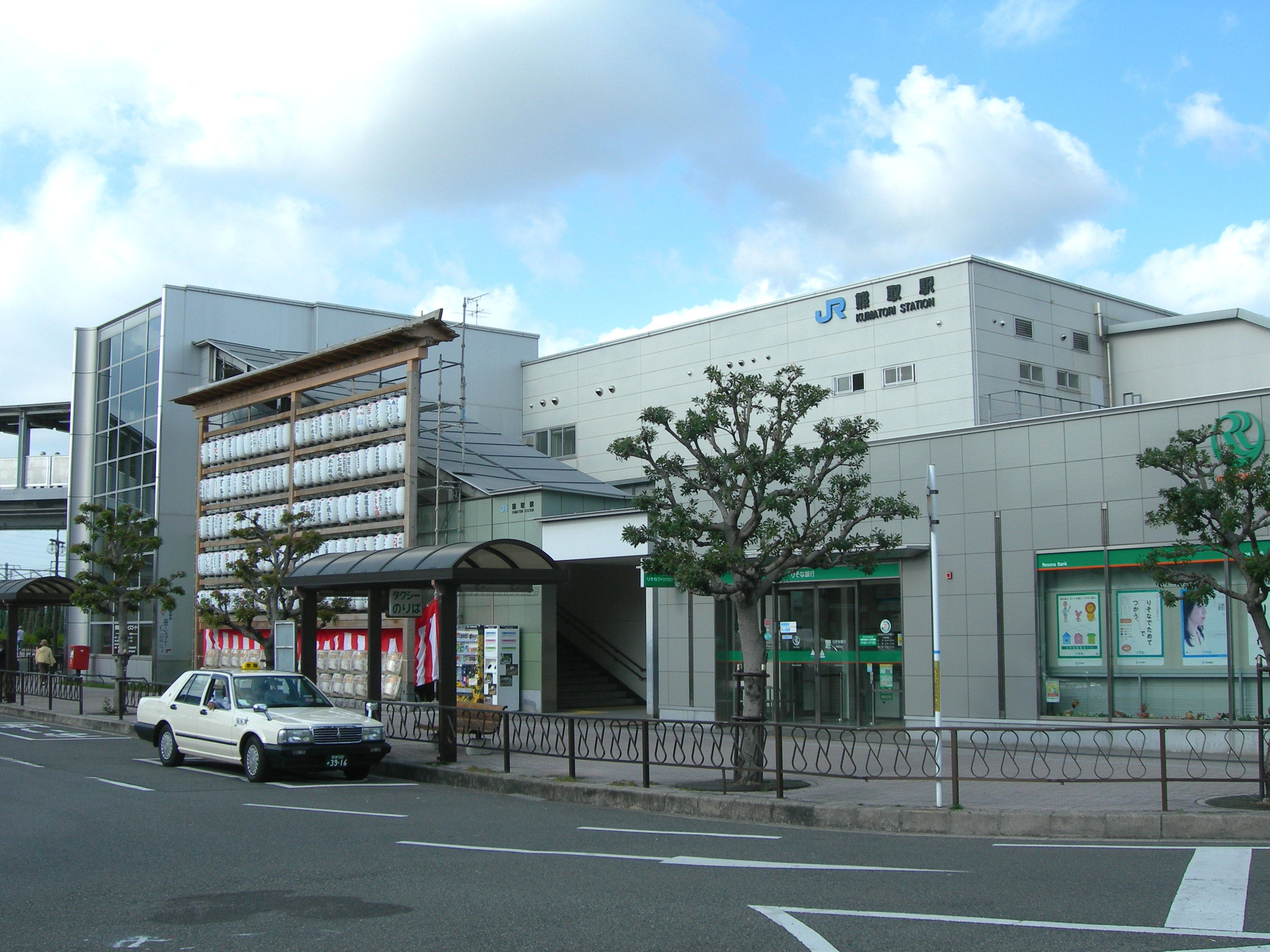 熊取駅東口